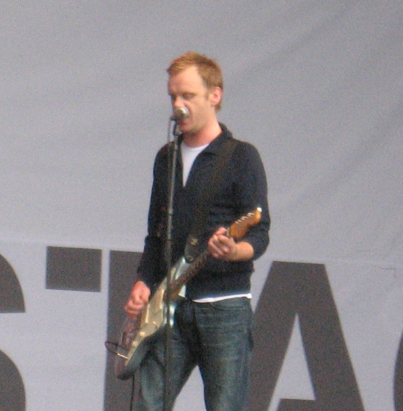 Johan (band), Jacco de Greeuw, Parkpop 2007, Den Haag